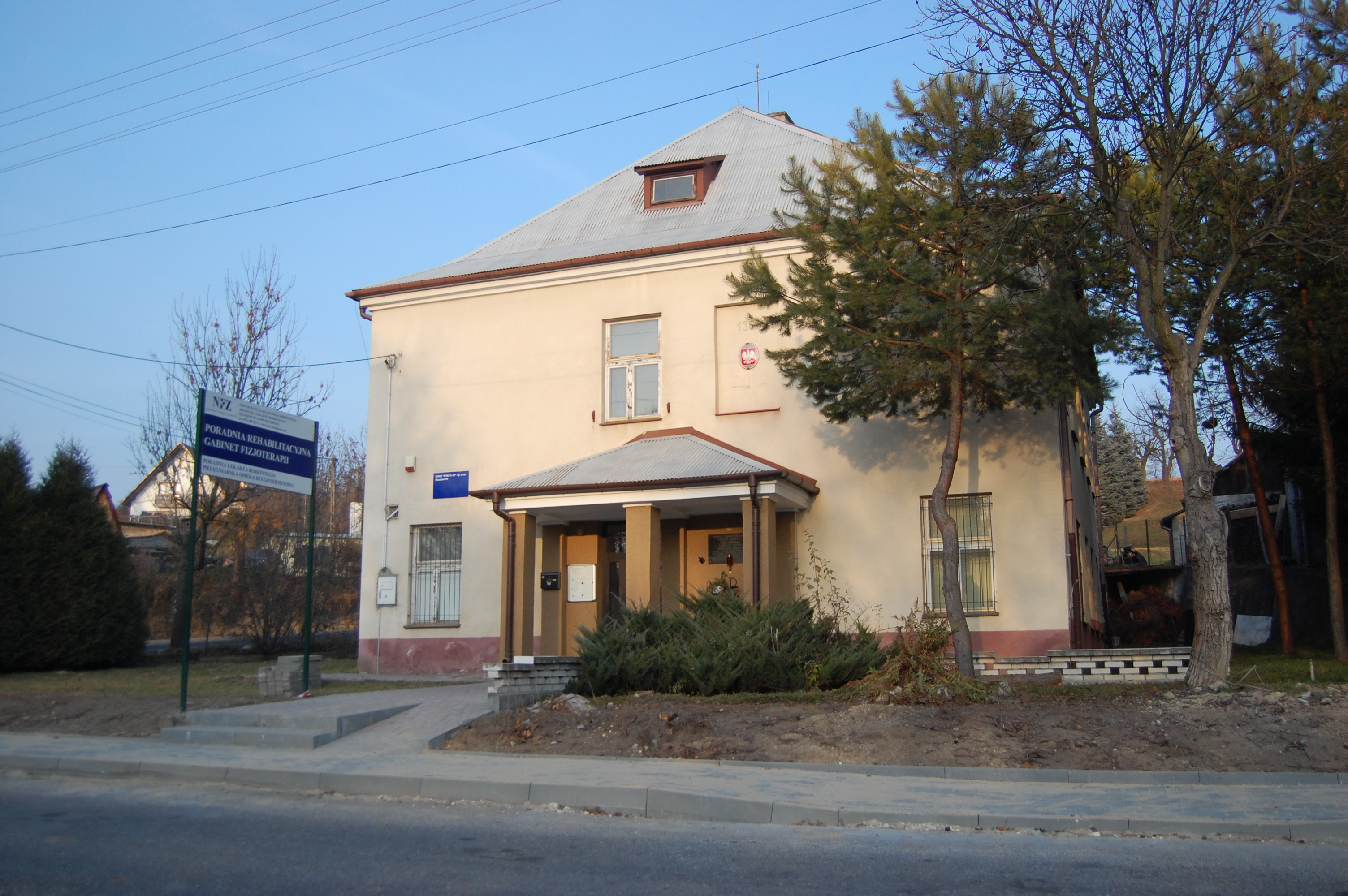 Budynek dawnej szkoły podstawowej w Maszkowie.